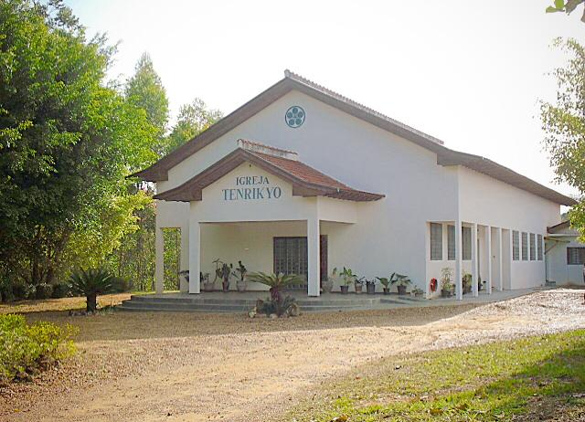 Igreja Tenrikyo Keiseki